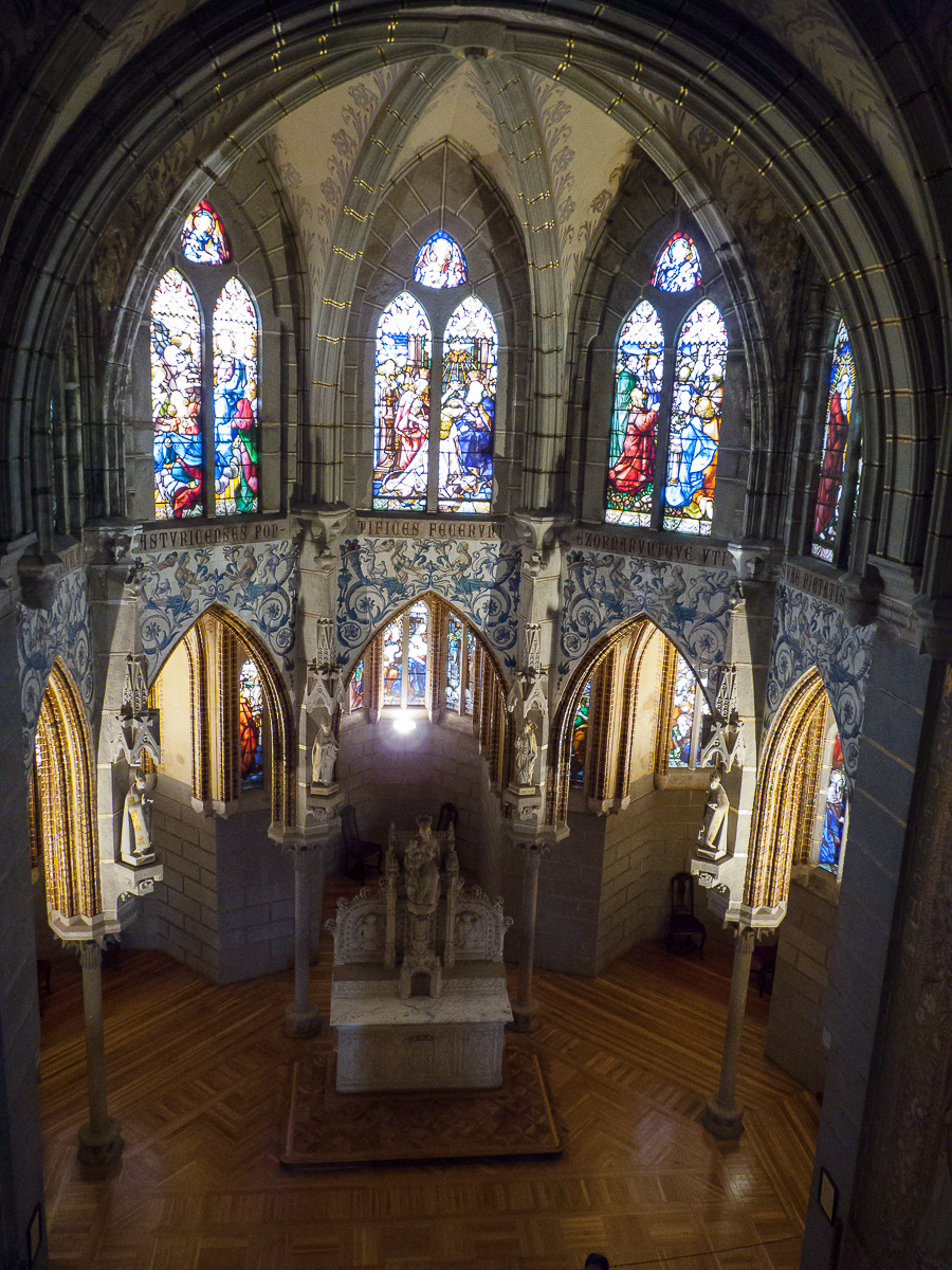 08082013 112708 ASTORGA 0033